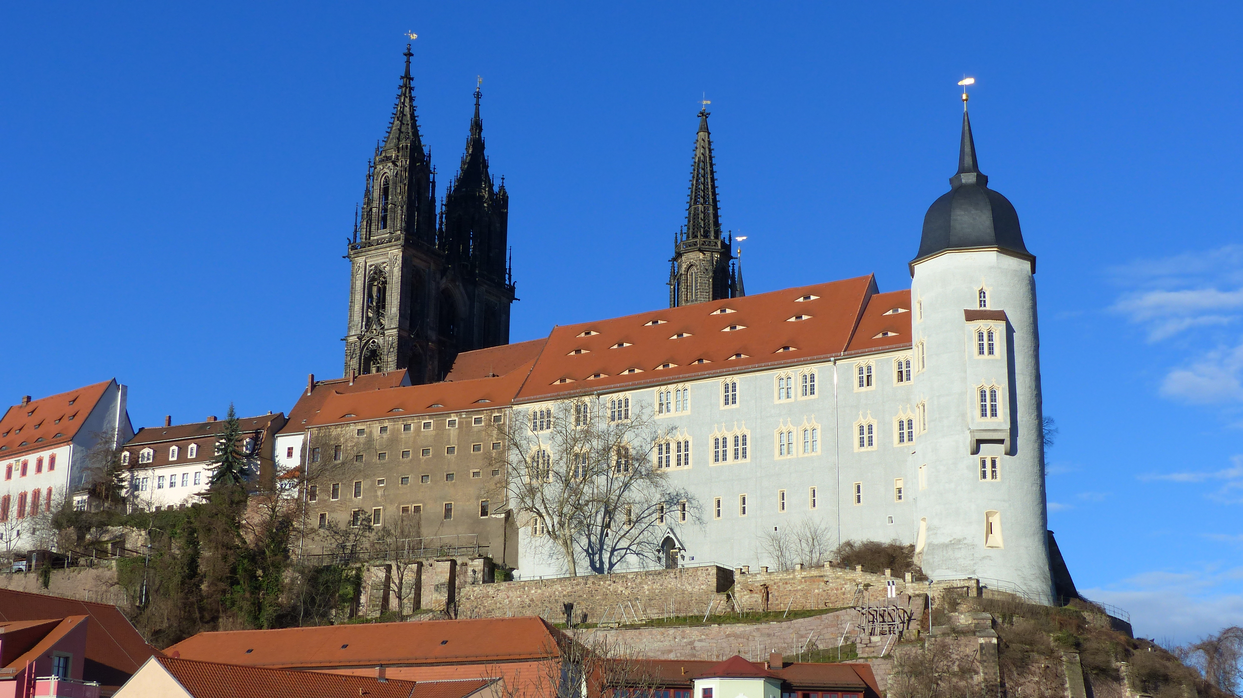 Ansicht der Südseite der Albrechtsburg in Meißen